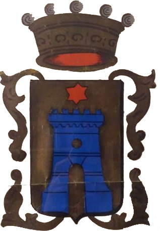 Blasone proveniente dal Fondo Gesù Castronovo di Roma